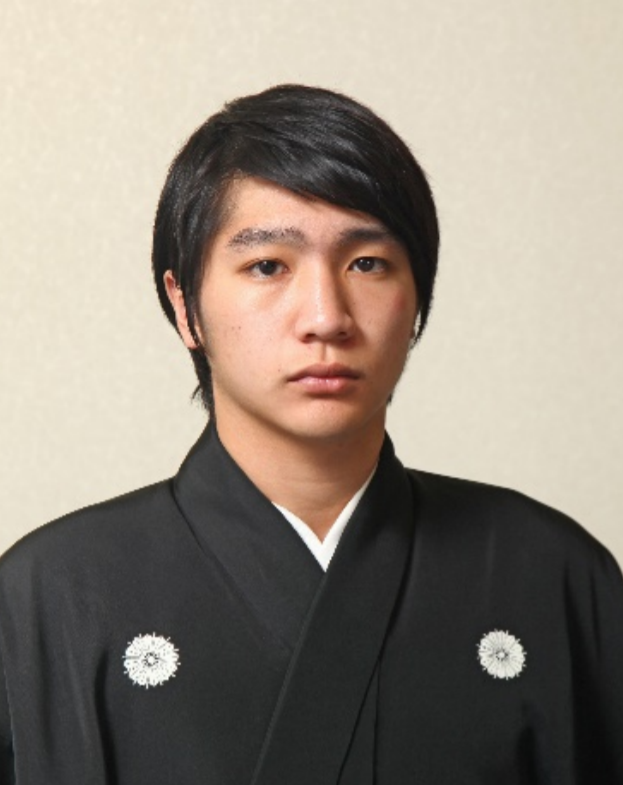 ＜観世三郎太＞二十六世観世宗家観世清和の子、能楽師